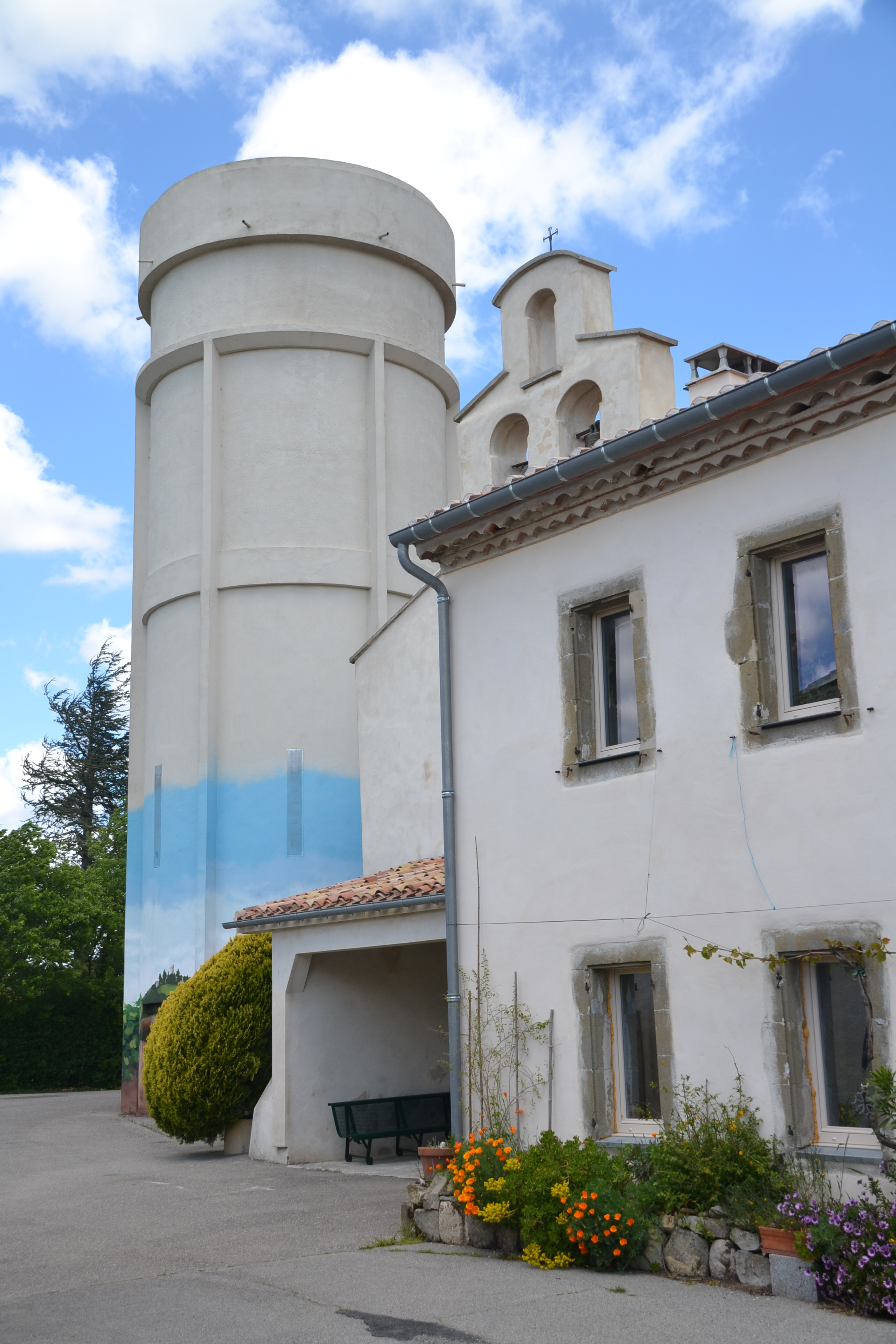 Château d'eau et église Saint-Martin de Hounoux (Aude, France).